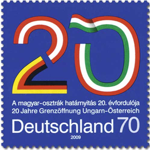 Sonderbriefmarke, 20 Jahre Grenzöffnung Ungarn-Österreich - Gemeinschaftsausgabe mit Ungarn und Österreich